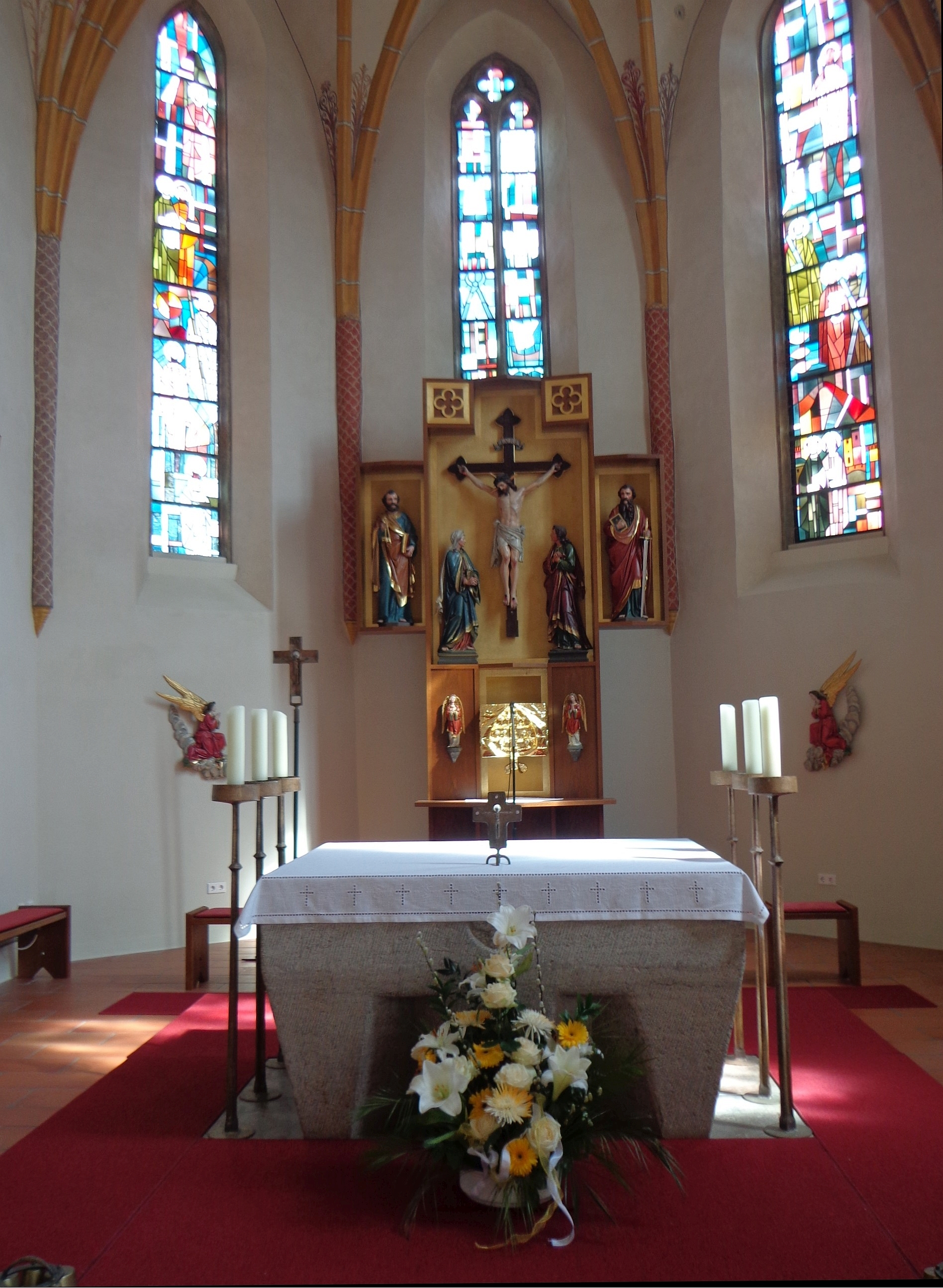 Pfarrkirche Tettenweis, Niederbayern: Blick zum Hochaltar